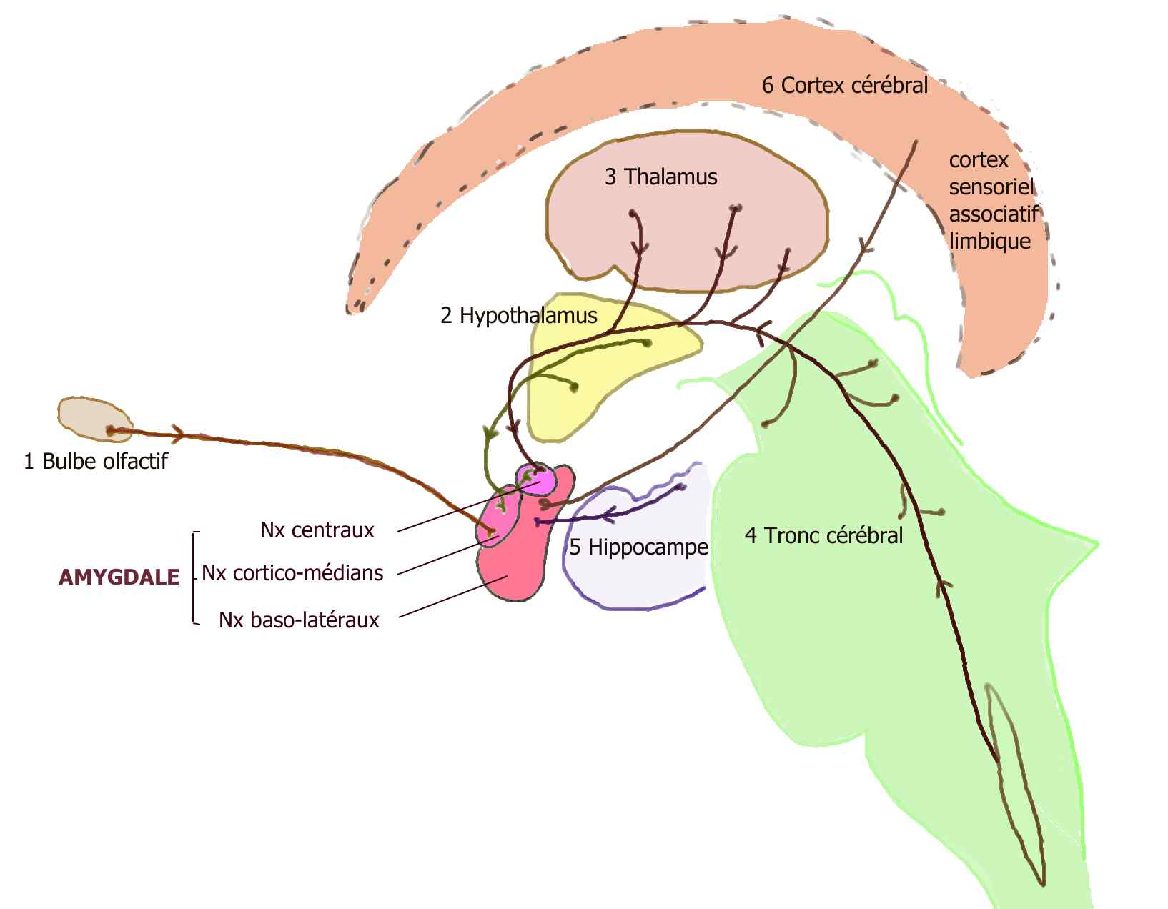 Afférences de l'amygdale, inspiré de Nieuwenhuys et al The Hum CNS Springer